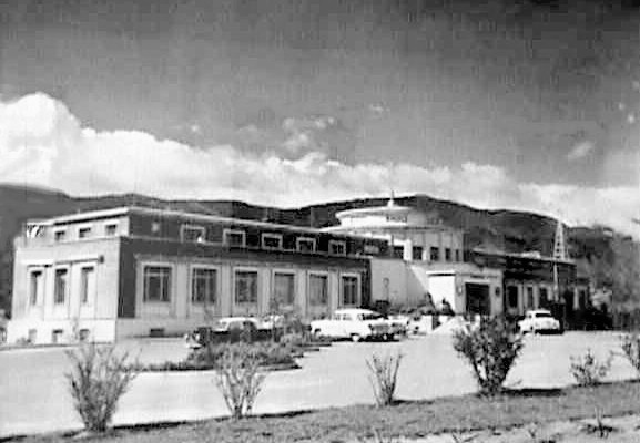 Observatorio Naval Caginal para la decada de 1950 Caracas - Venezuela